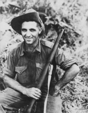 Sergent Tom ('Diver') Derrick VC